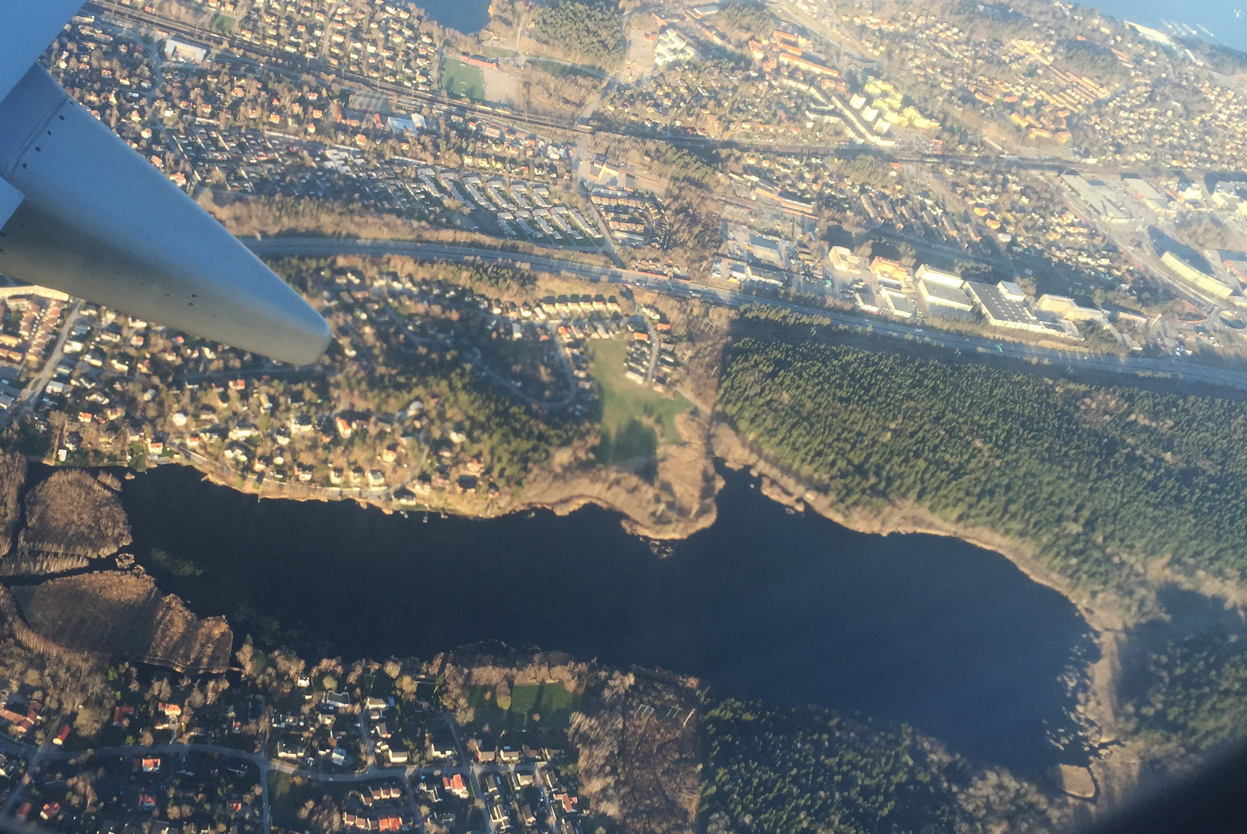 Ravalen, flygfoto